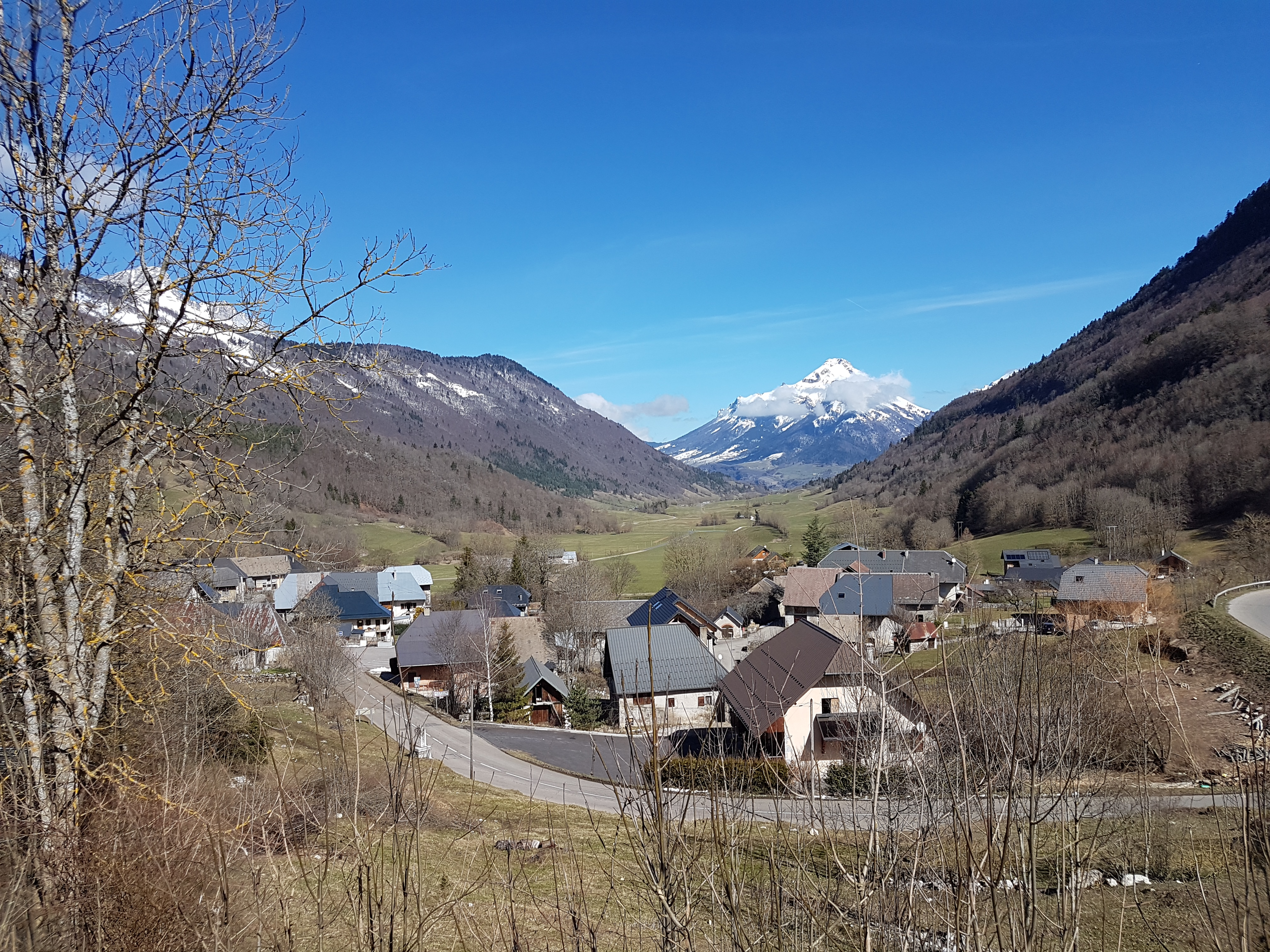 Hameau de Routhennes, commune de Sainte Reine, vallée de Sainte Reine, sommet le Trélod au fond